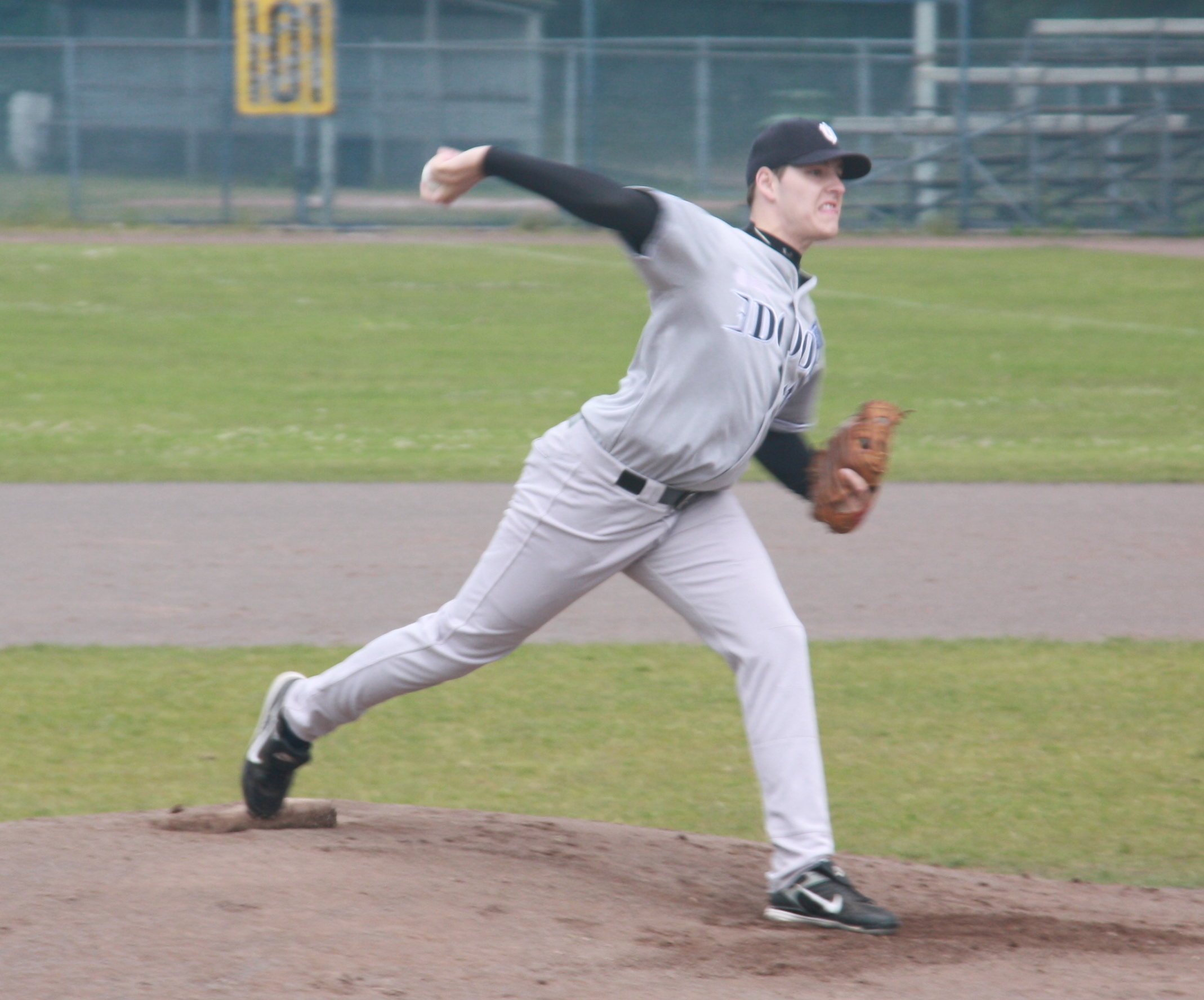 Honkbalwedstrijd tussen HCAW en Neptunus (honkbal) op 7 juni 2009. Pitcher Kevin Heijstek (Neptunus)